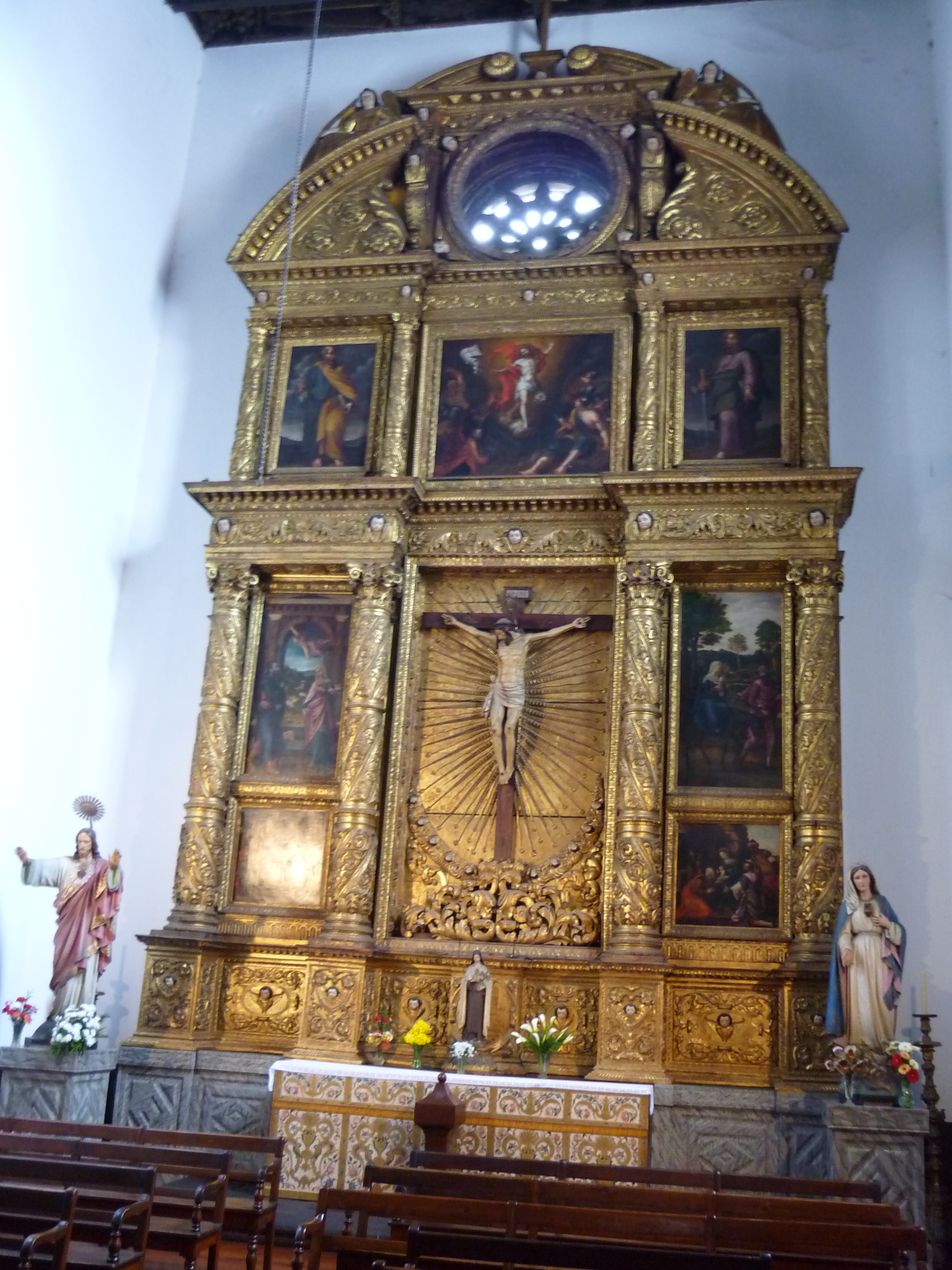 Jézus Urunk oltára a funchali (Madeira) székesegyházban (17. század második fele)